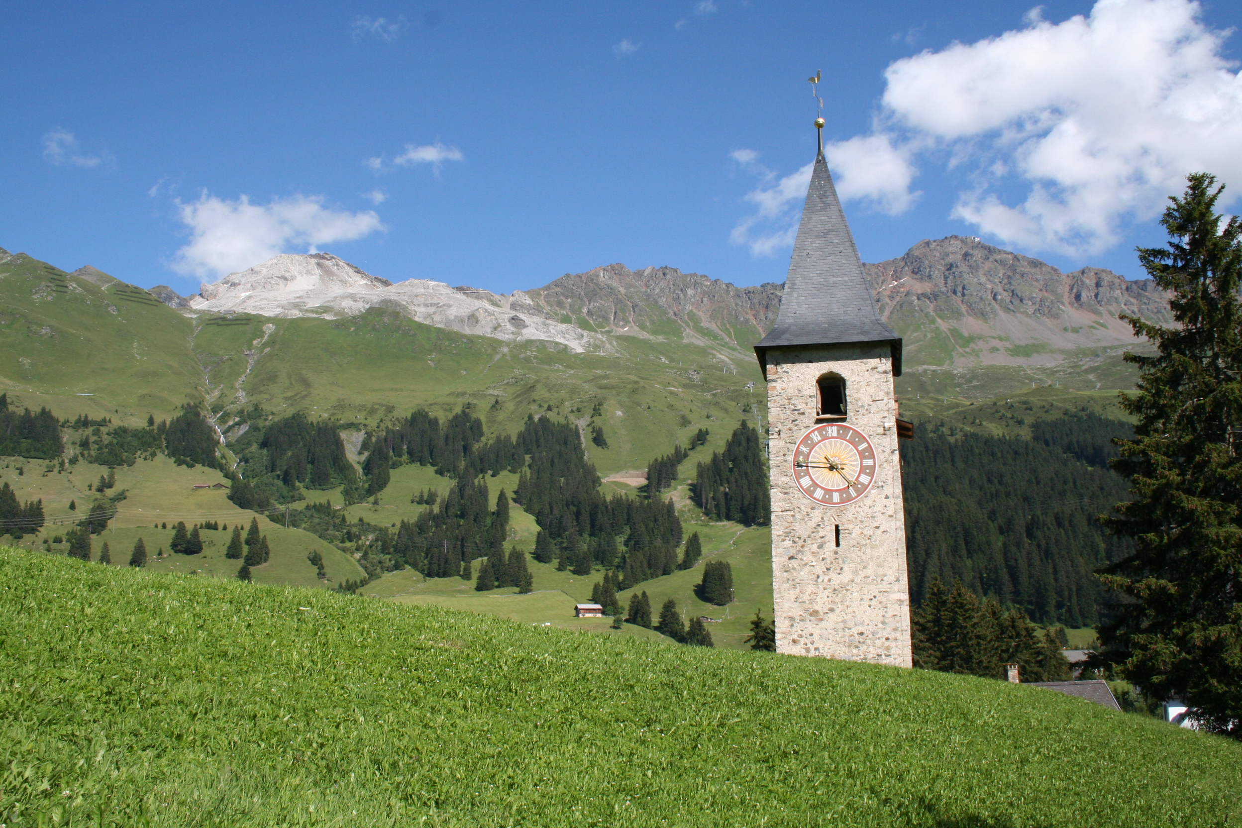 Kirche in Parpan; links das Parpaner Weisshorn, rechts das Rothorn